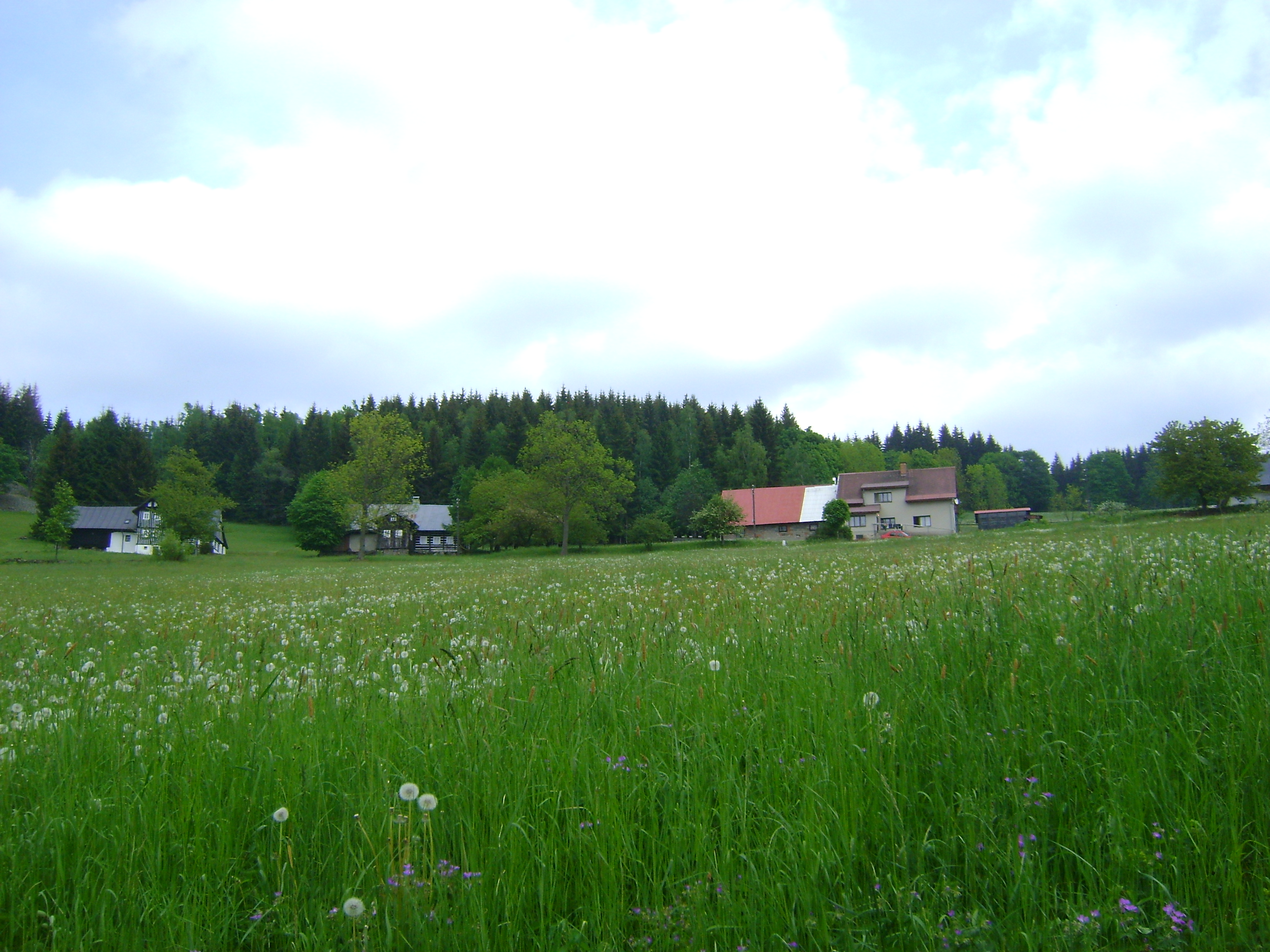 Hejlov – wzniesienie (835 m n.p.m.)w północno-środkowych Czechach, w Sudetach Zachodnich, na Podgórzu Karkonoskim (czes. Krkonošské podhůří).